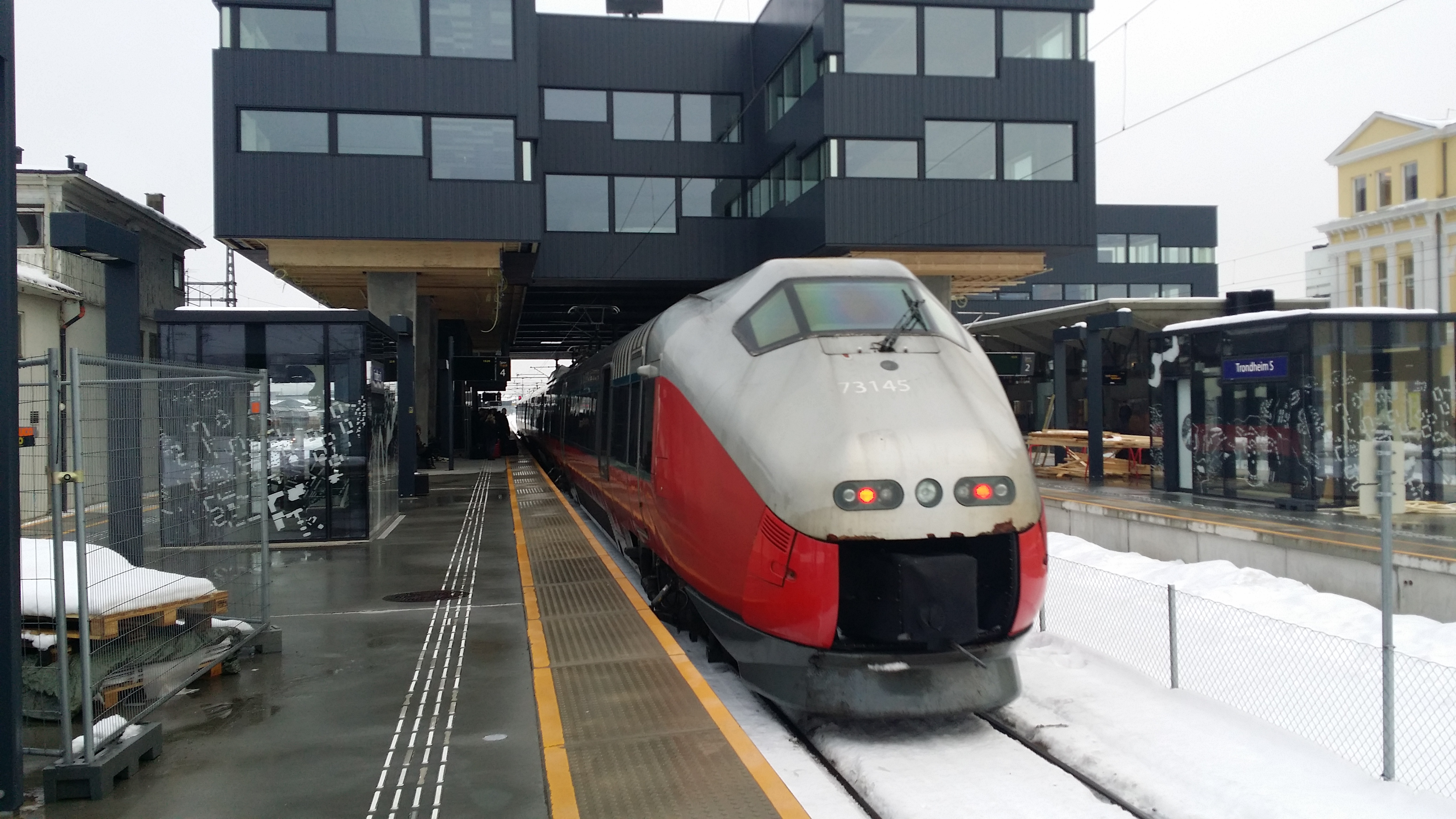 Ved den siste store ombyggingen ble plattformsporene overbygget.